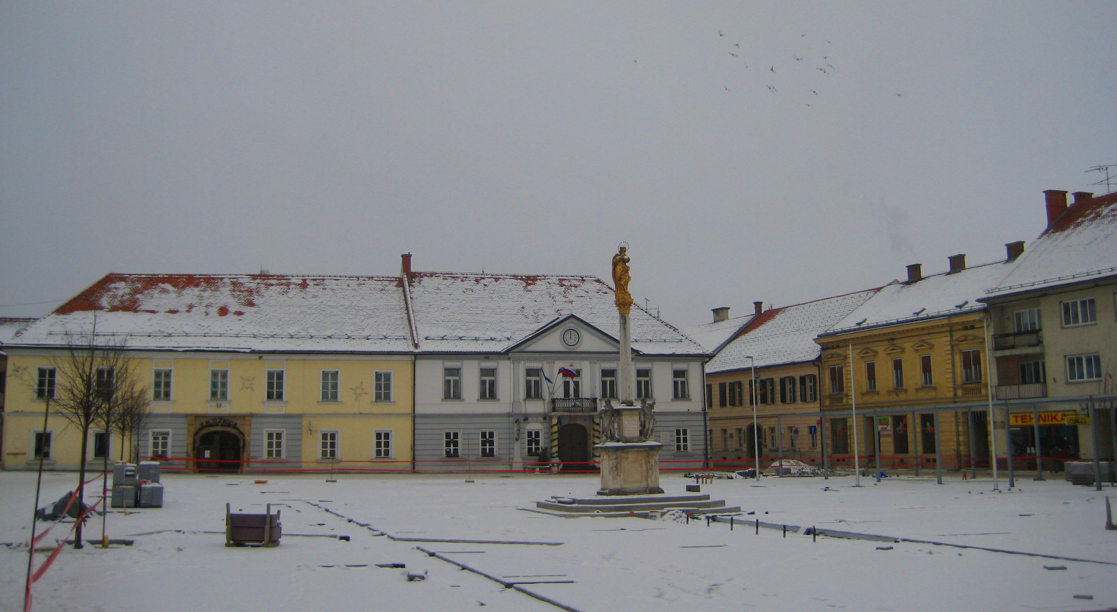 Main square at Ljutomer, Slovenia